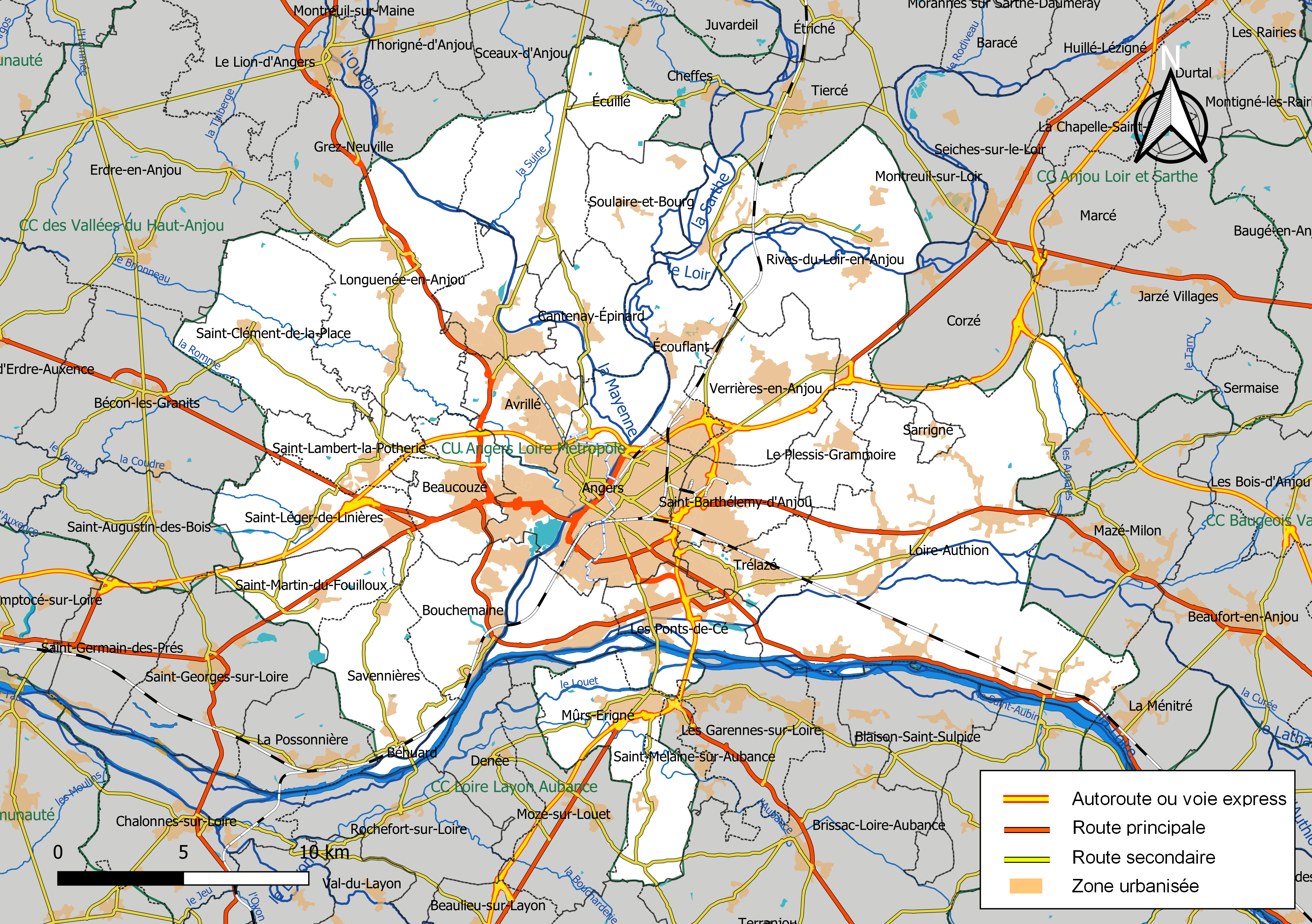 Carte géographique de l'intercommunalité Angers Loire Métropole, département de Maine-et-Loire, France. Composition au 1er janvier 2019.